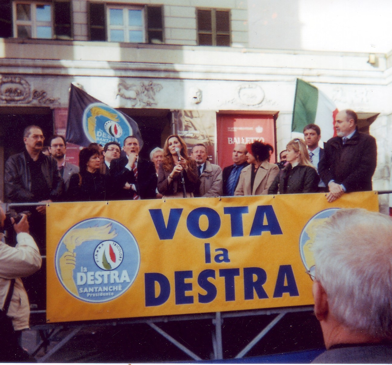 Daniela Santanchè a Genova La Destra